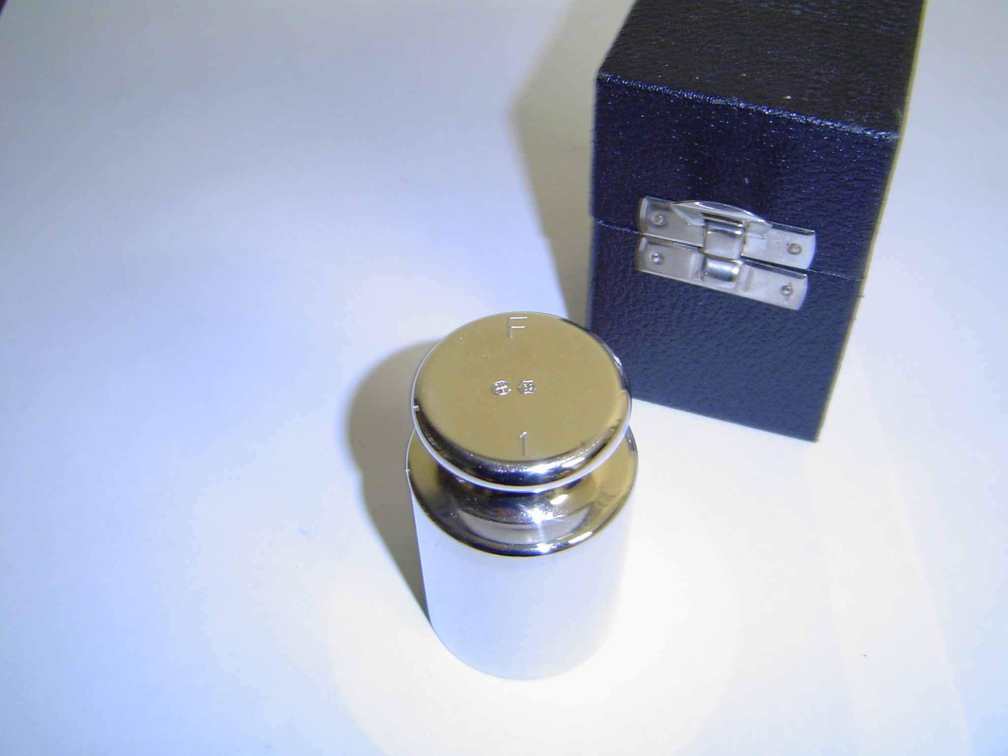 Photo de ma collection personnelle